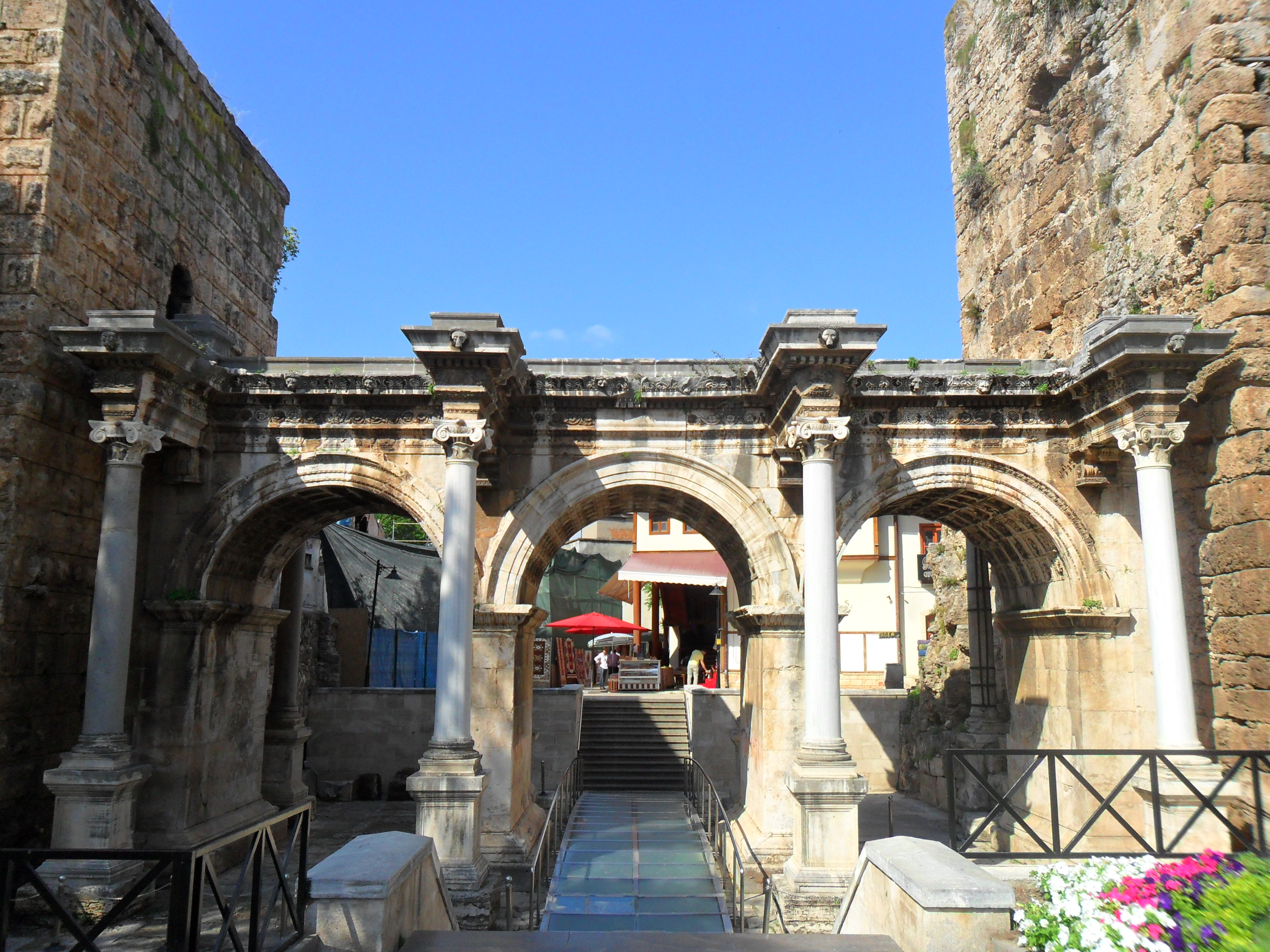 Antalya'daki Hadrian Kapısı'ndan bir görünüm.